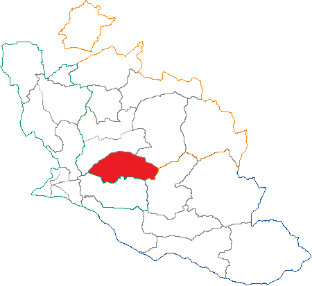 Situation du canton dans le département de Vaucluse (France)